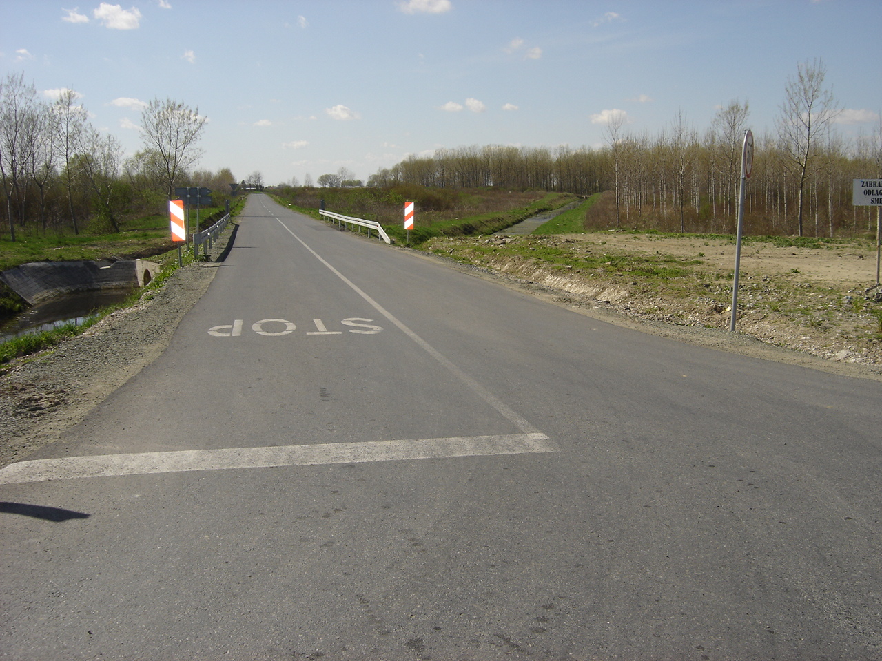 Županijska cesta Ž4035 u Baranja